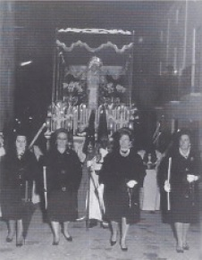 Nuestra Señora de la Esperanza años 50.